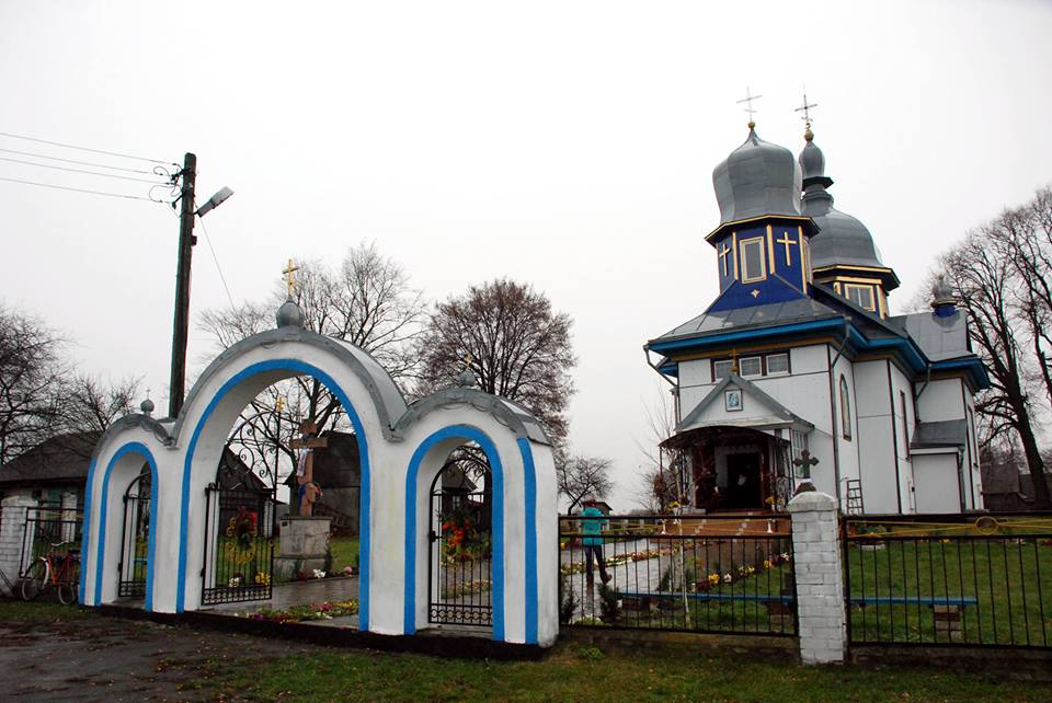 Церква в селі Боровичі